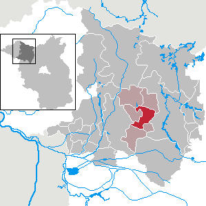 Märkisch Linden in Brandenburg (Country) - District Ostprignitz-Ruppin